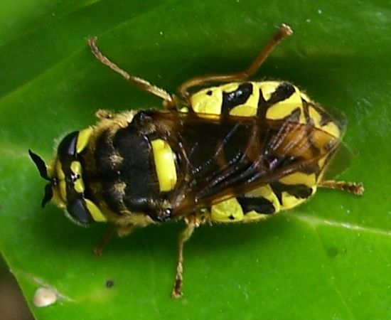 Stratiomys maculosa Made in San Jose, California, USA. Identified by Ron Hemberger and Martin Hauser.